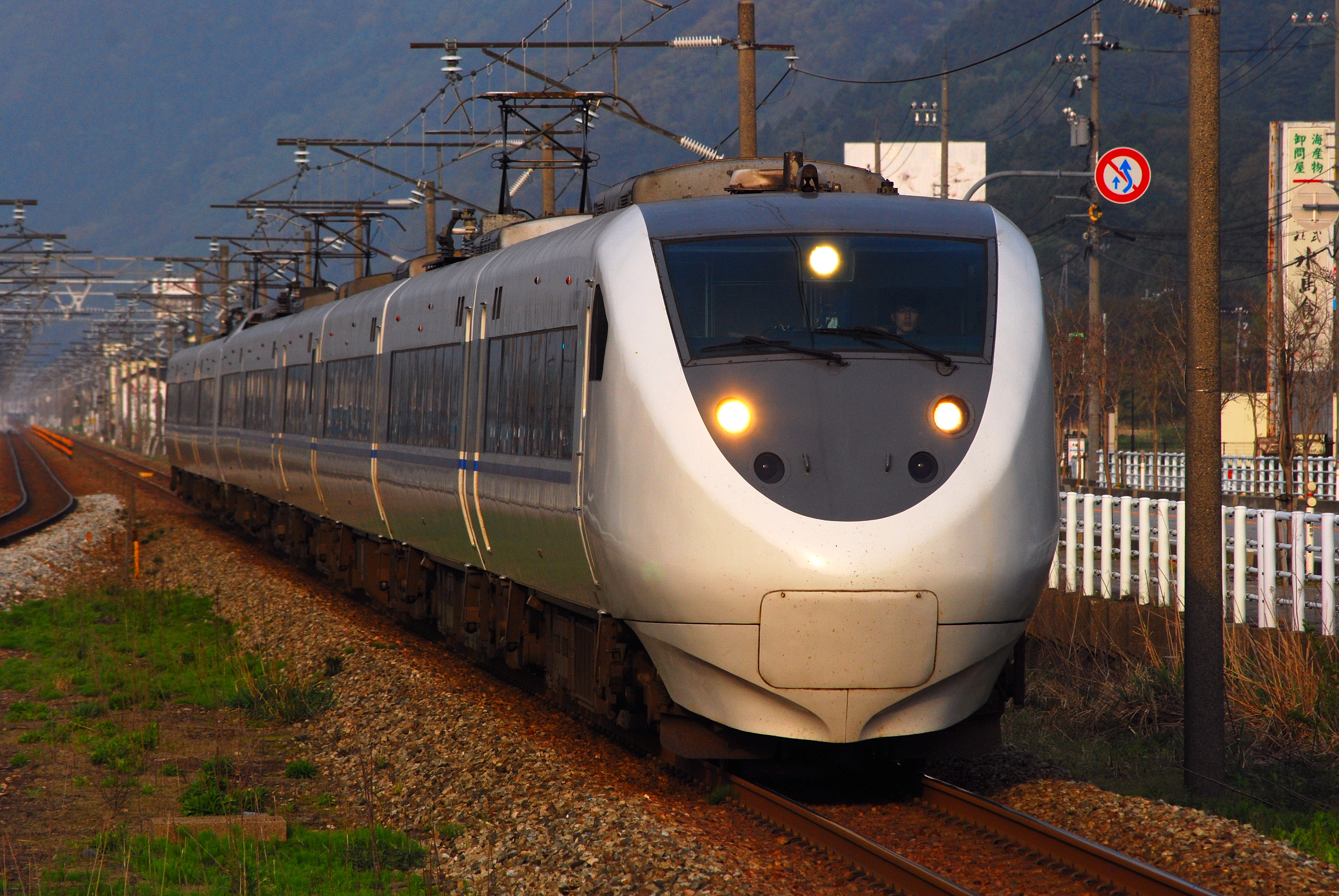 w編成によるはくたか（越中宮崎駅ホームで撮影）